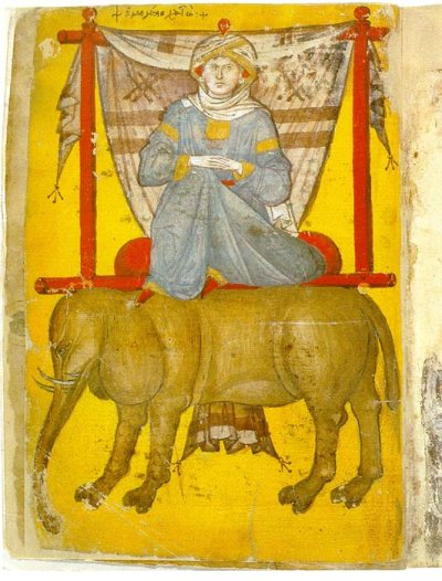 Idealbildnis der Sitti Hatun, Mehmeds II. Ehefrau, im 15. Jahrhundert im byzantinischen Stil gemalt. Aus dem Cod. marc.graec. 516 Bibl. Marciana, Venice Text über dem Bildnis: ἡ μεγάλη Χατώ (die große Chatun) Siehe: Franz Babinger: Mehmed’s II. Heirat mit Sitt-Chatun (1449). In: Islam. Band 29 (1950), S. 231.